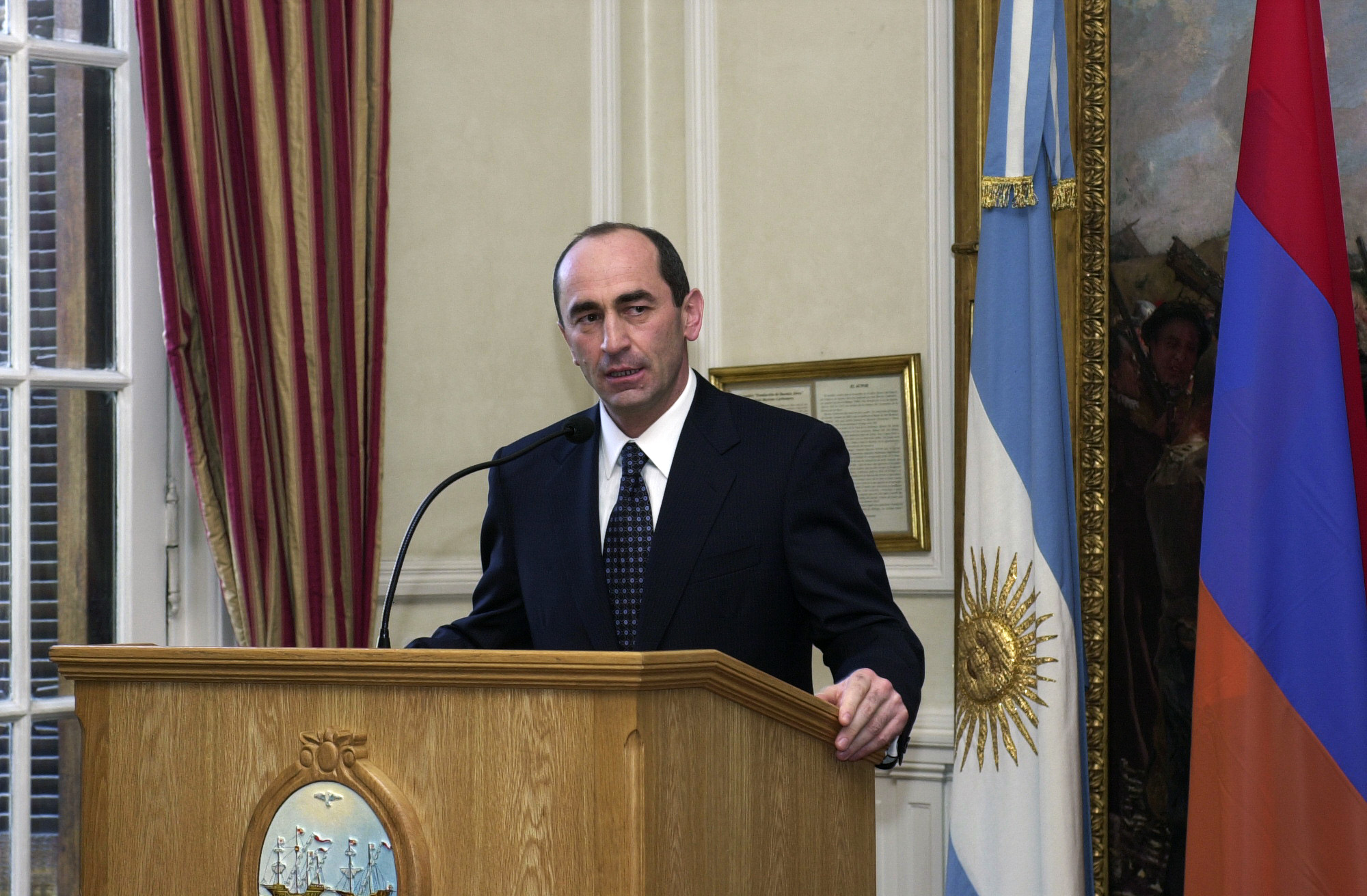 Выступление Президента Роберта Кочаряна на Аргентинского совета по международным отношениям